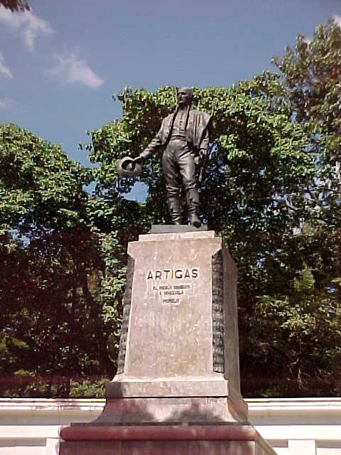 Plaza Artigas en el municipio Libertador, Distrito Capital - Venezuela (2000)